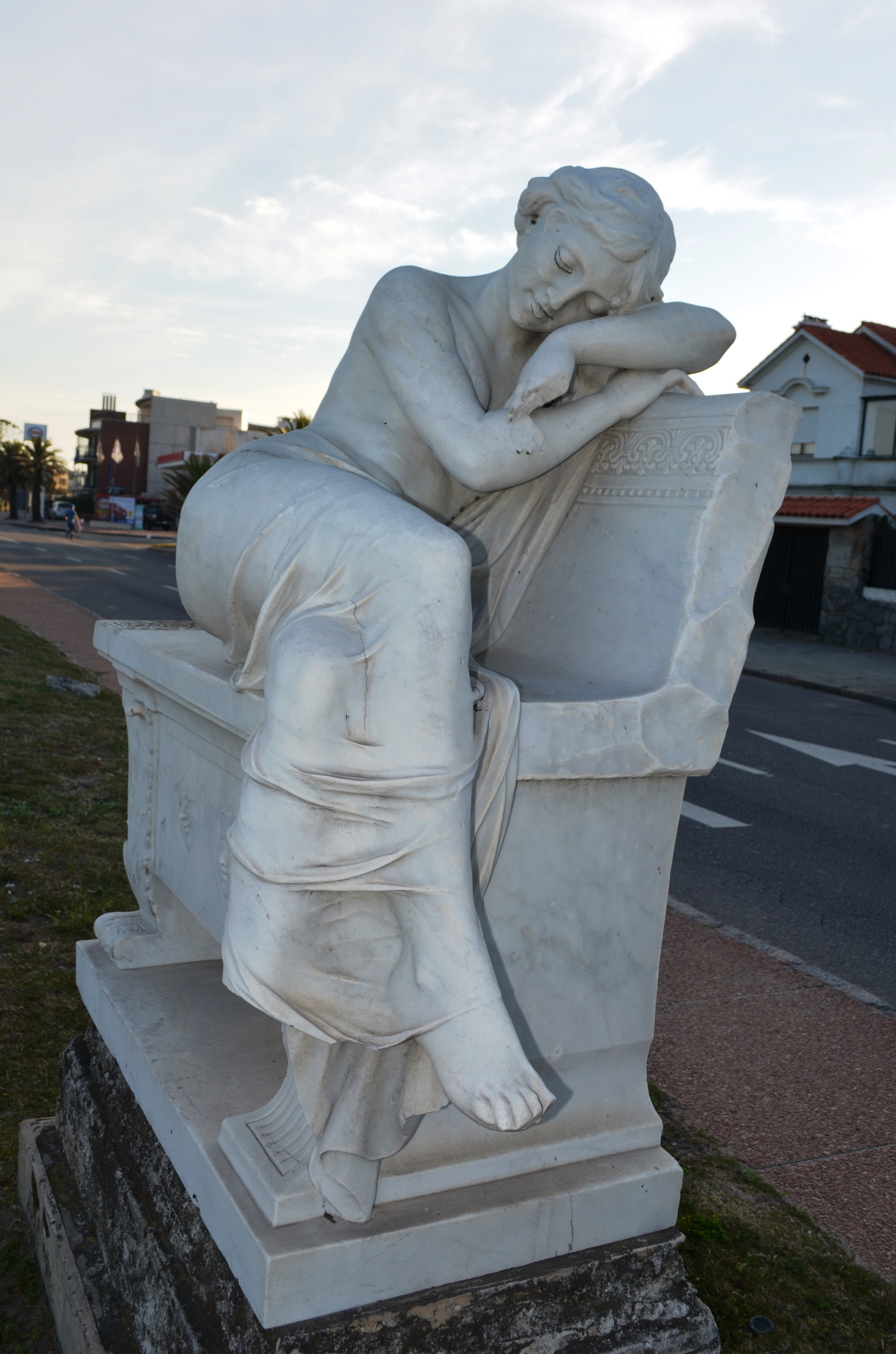 El sueño. Ubicada en el departamento de Montevideo